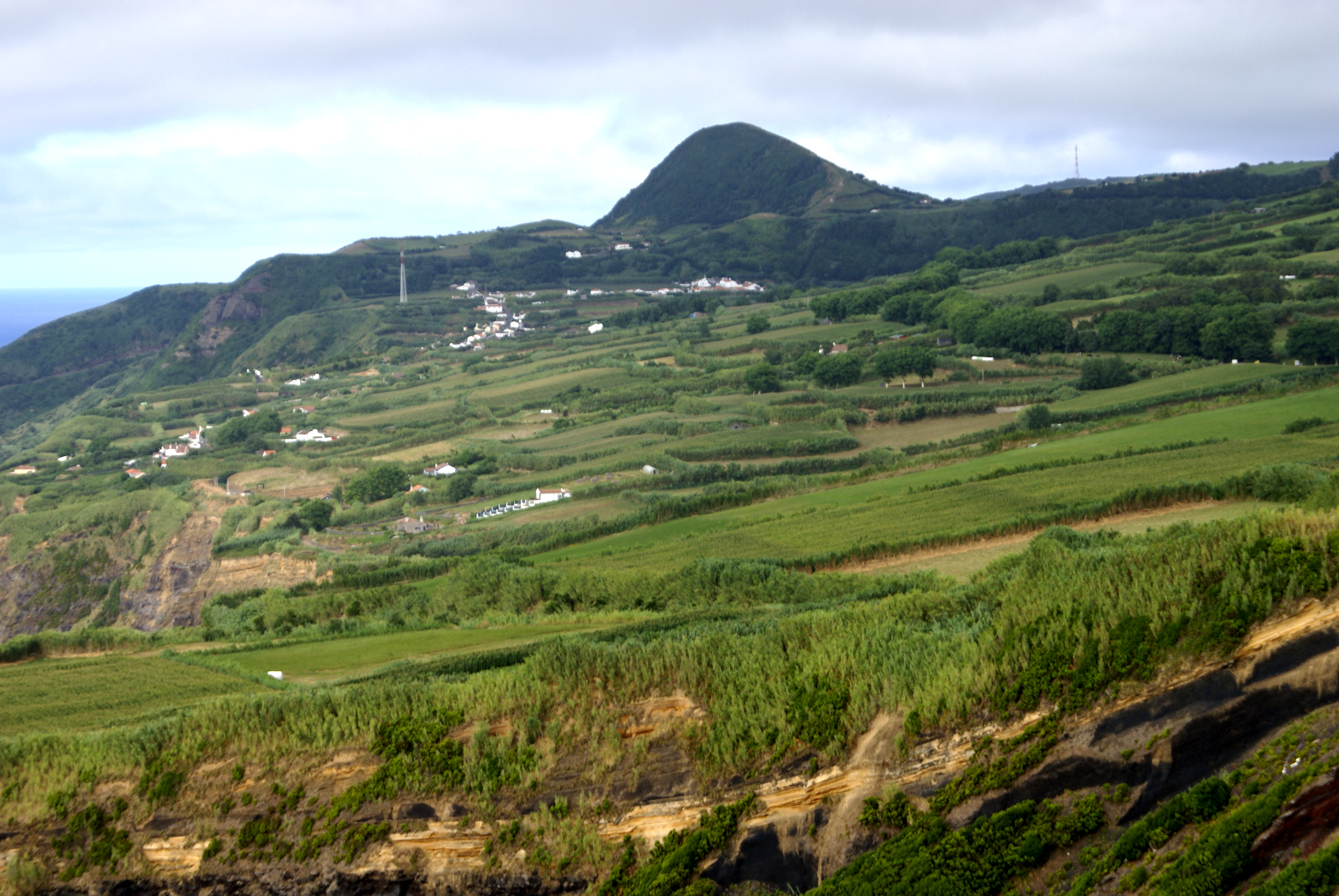 Miradouro da Ponta do Escalvado, vista parcial da Várzea, Ponta Delgada, ilha de São Miguel, Açores